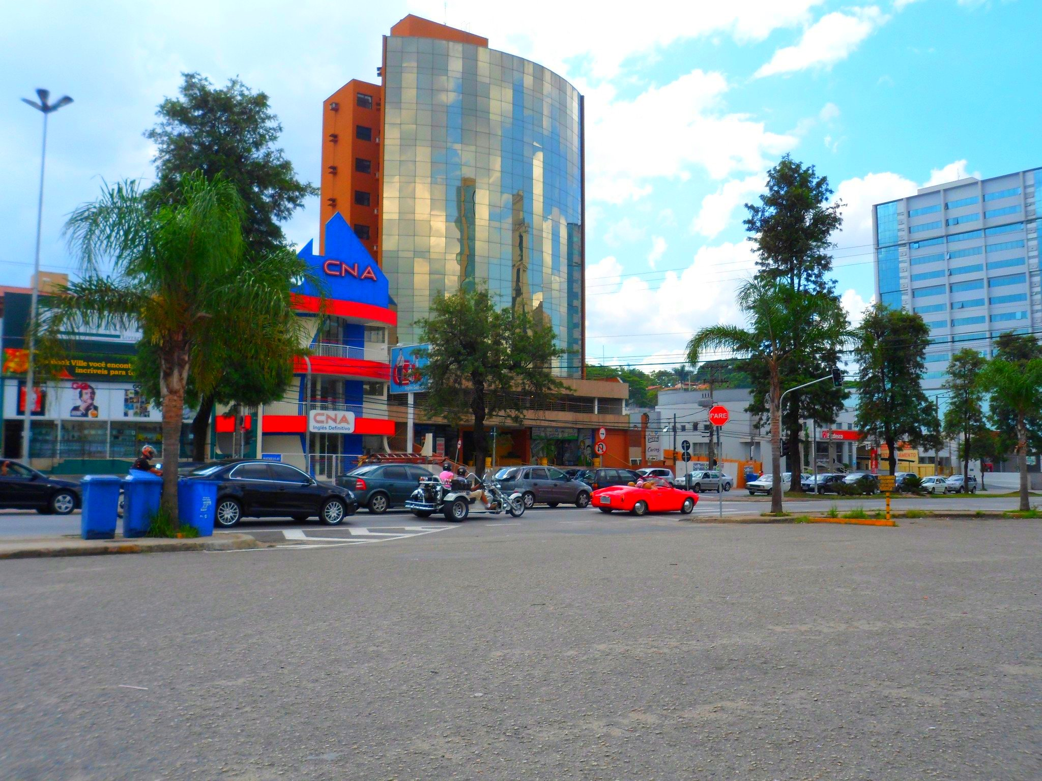 SOROCABA-SP